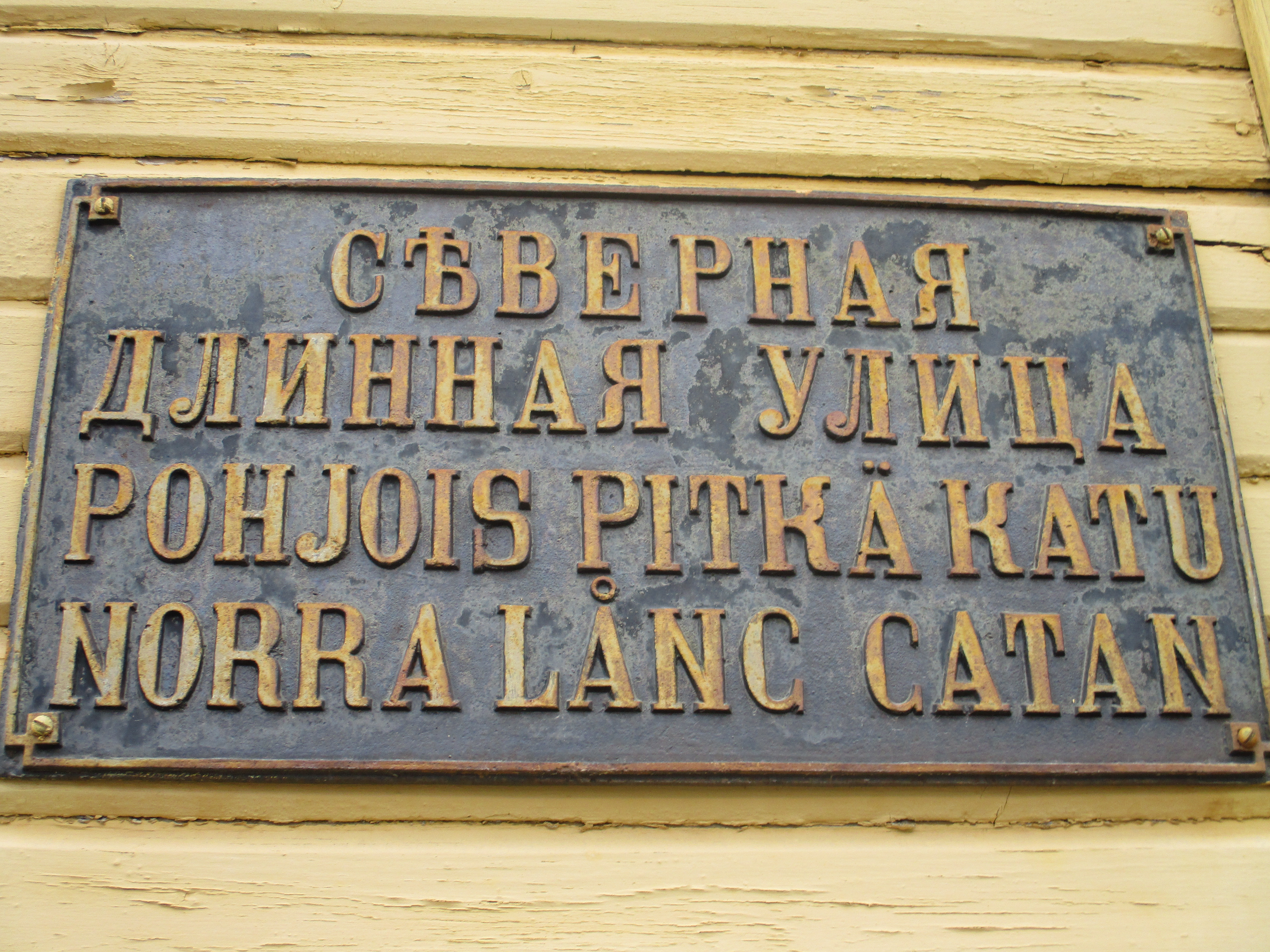 Päärnäinen